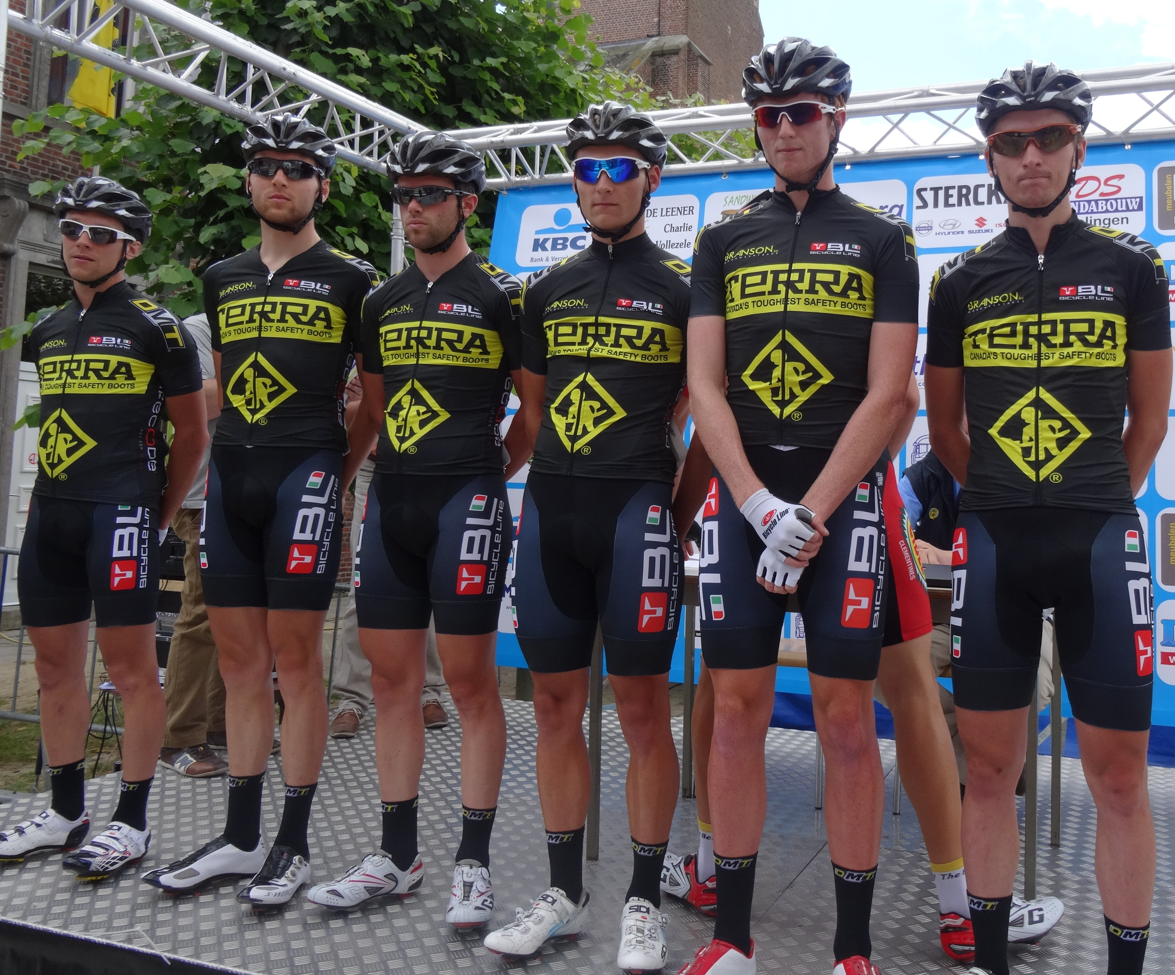 Reportage photographique réalisé le mercredi 25 juin à l'occasion du départ et de l'arrivée de l'Internationale Wielertrofee Jong Maar Moedig 2014 à Oetingen (Gooik), Belgique.